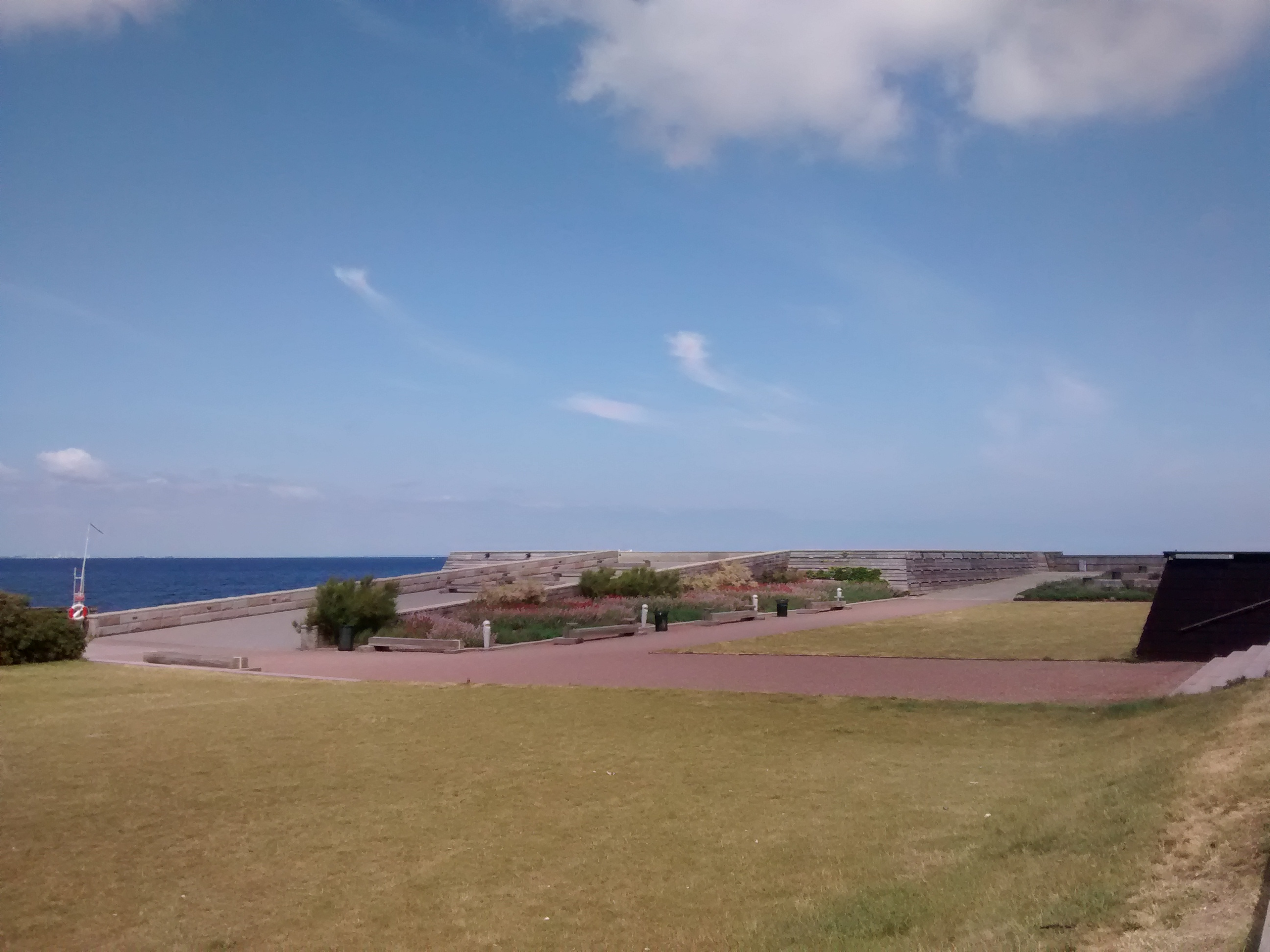 Daniaparken